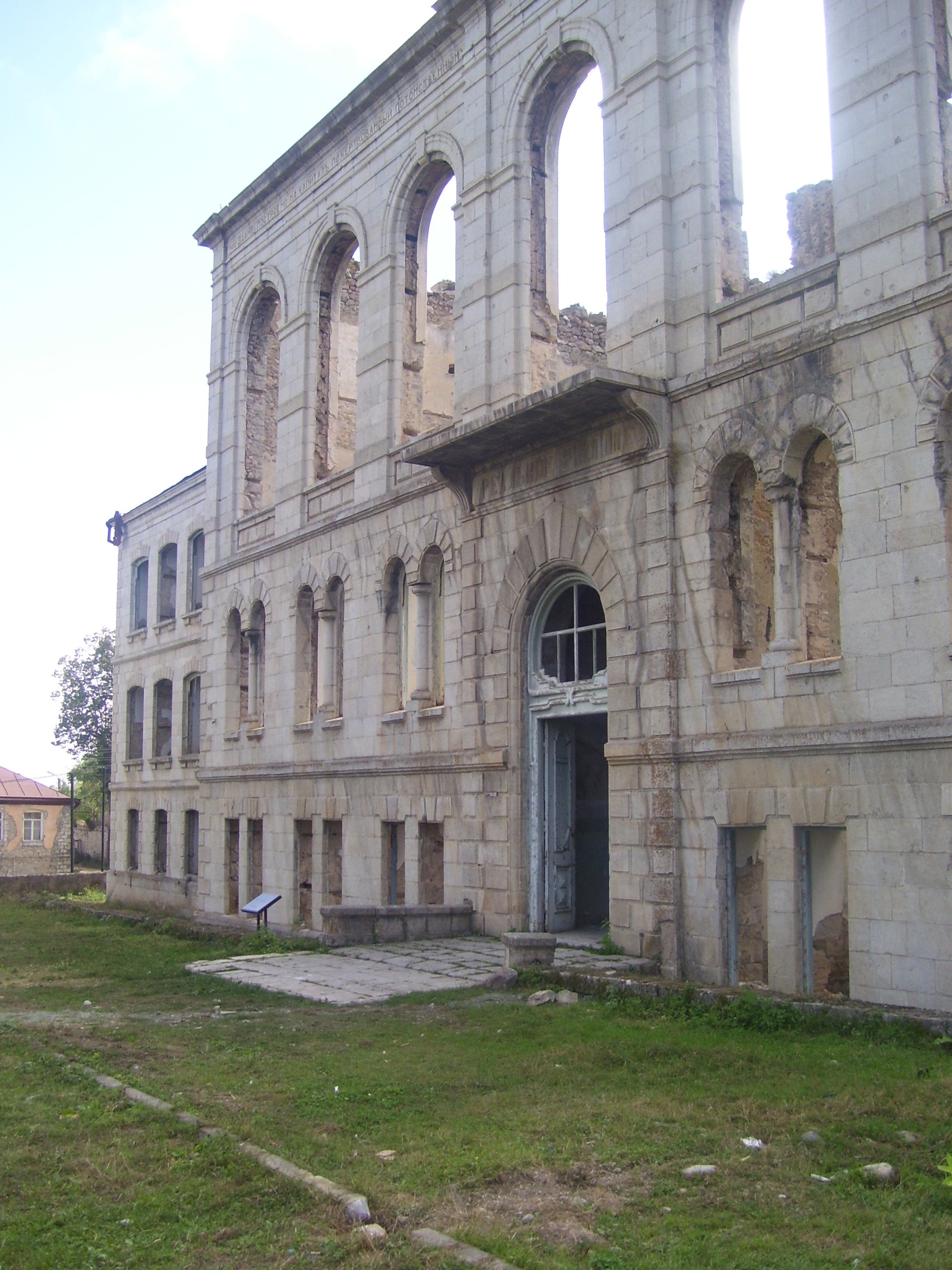 Realnı məktəbinin binası. XX əsr. Şuşa şəhəri, keçmiş 1 May küç., 1